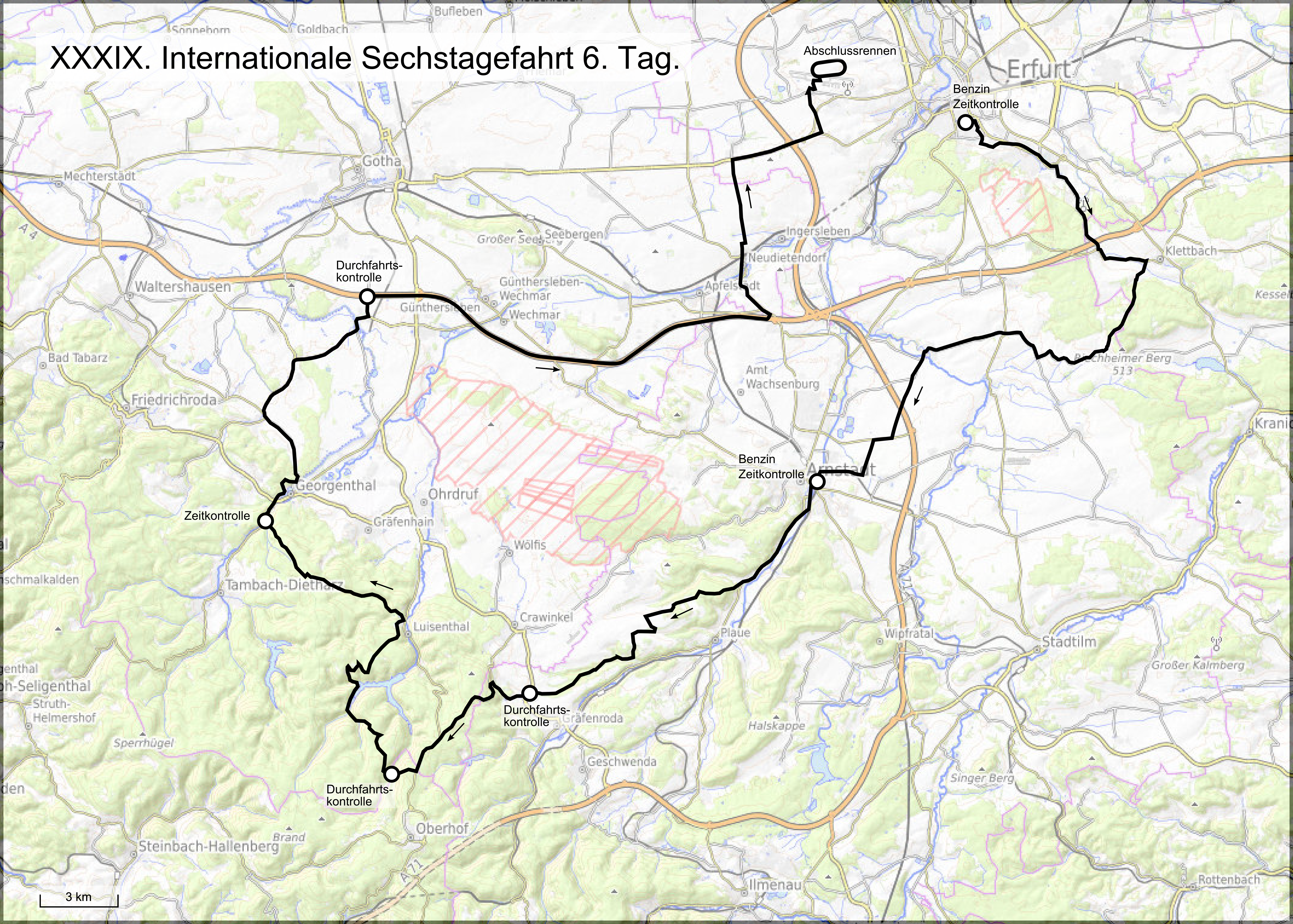 Karte der 39. Internationale Sechstagefahrt, Route des 6. Tages